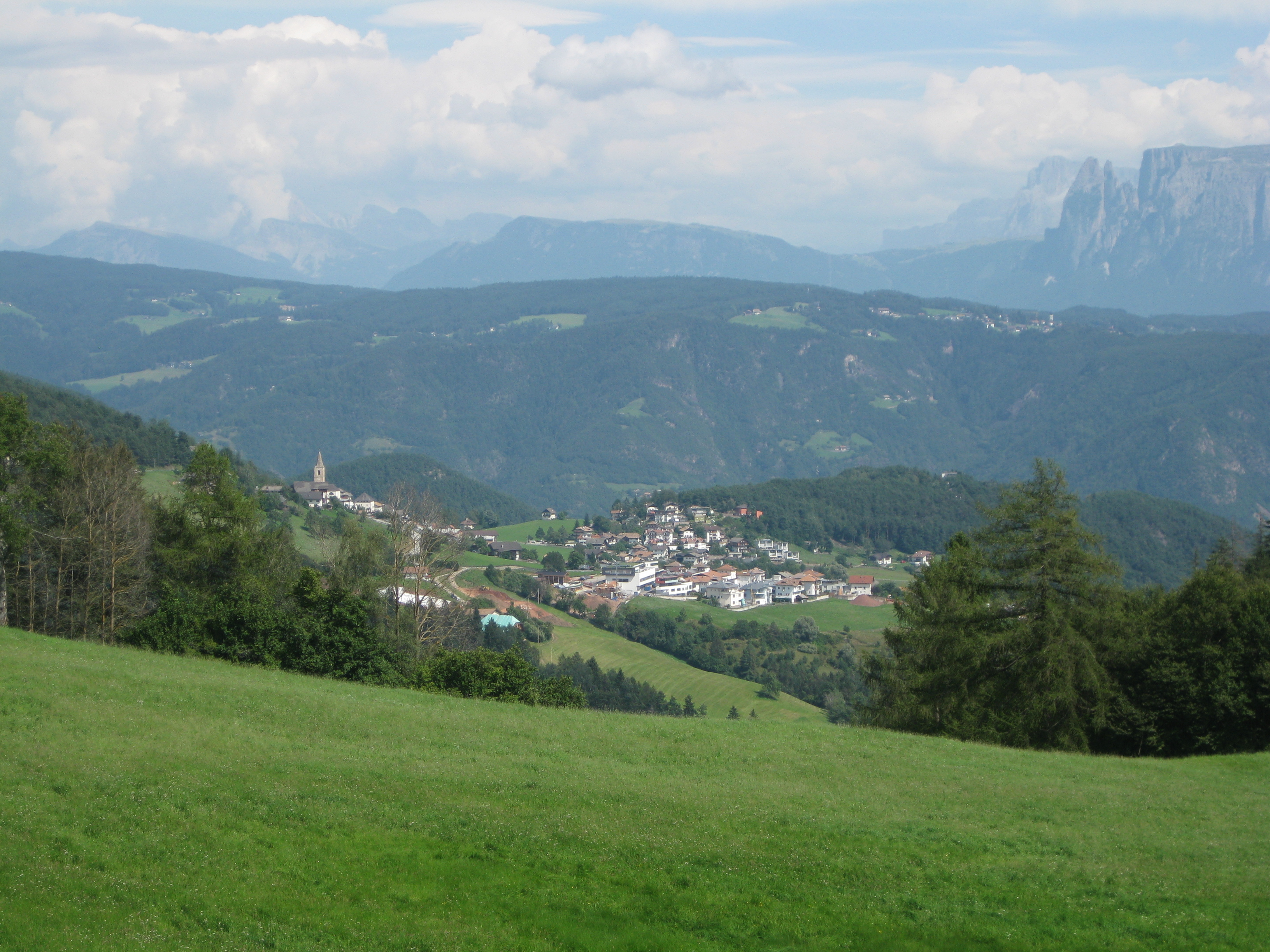 Jenesien von Glaning (von Westen) aus gesehen